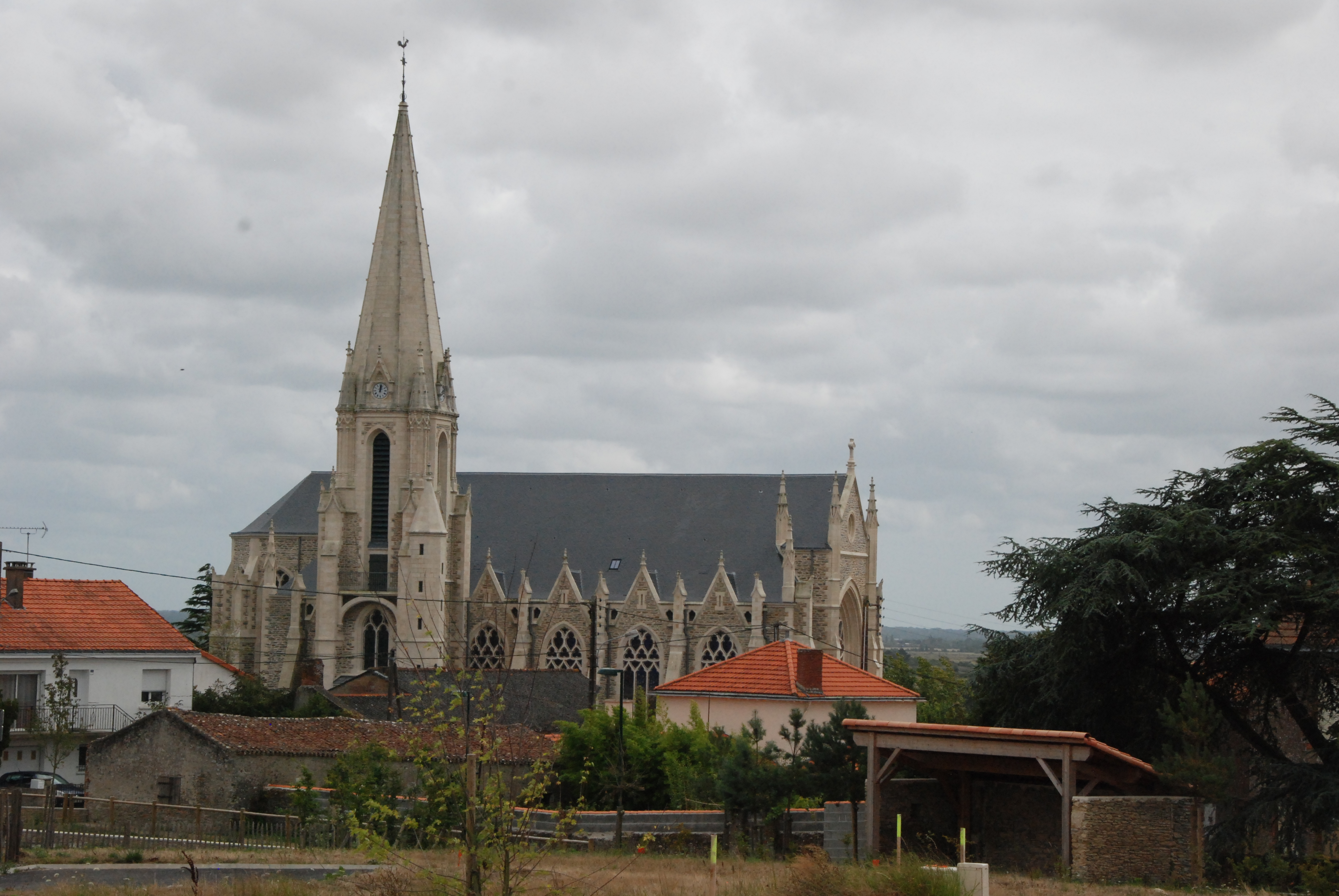 Eglise de Saint-Cyr-en-Retz (Loire-Atlantique)